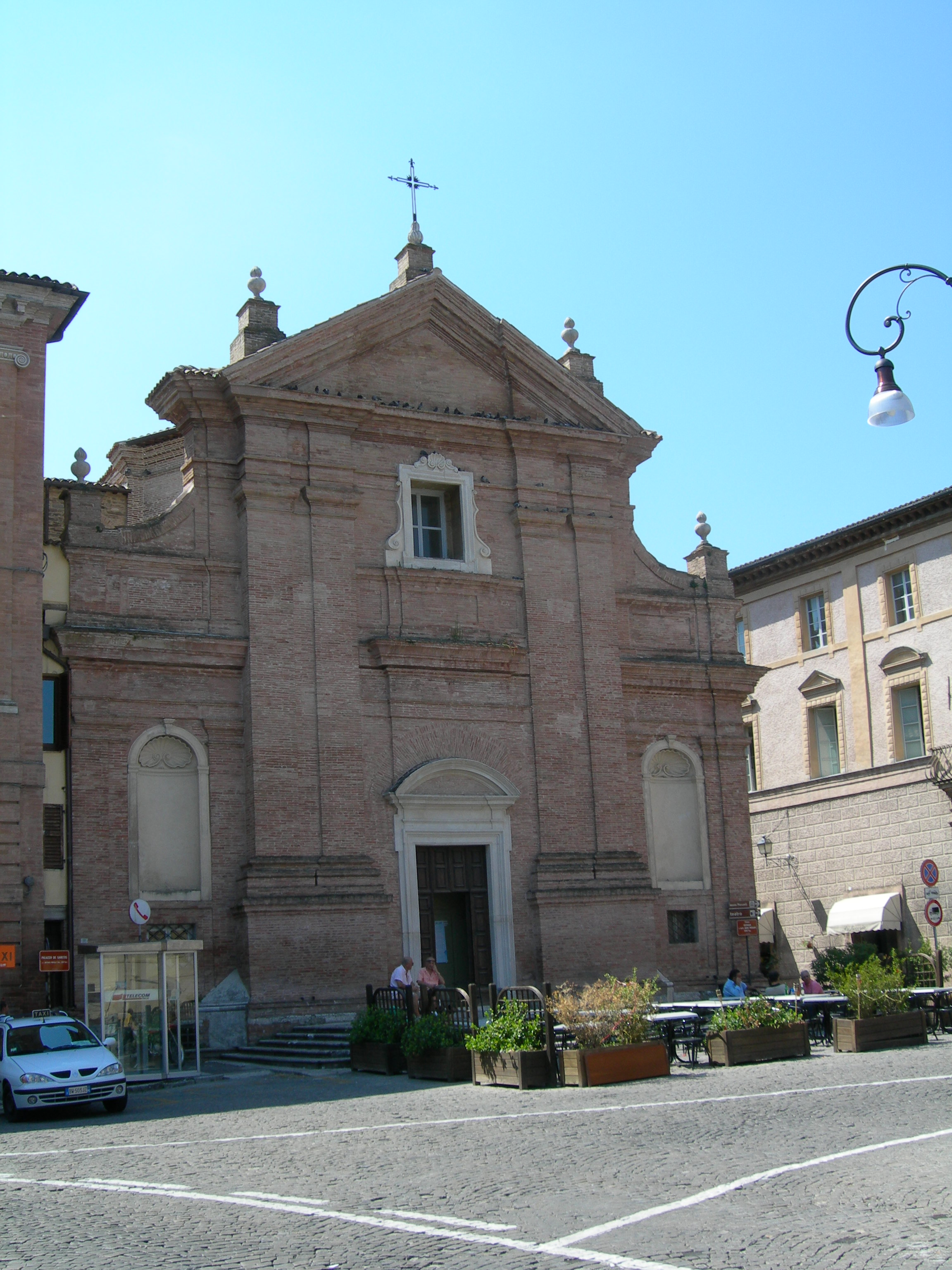 Chiesa del suffrgio, Matelica